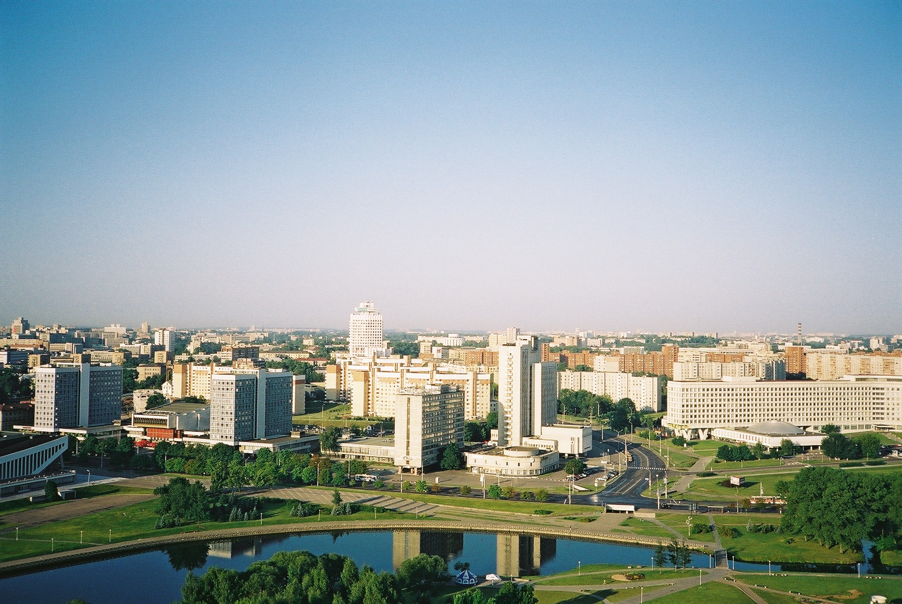 view of Minsk